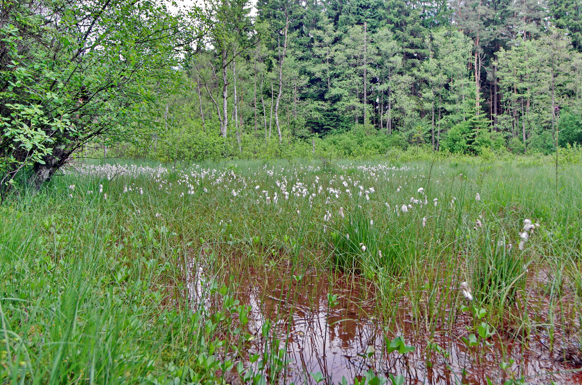 Přírodní rezervace Mechové údolí, okres Cheb